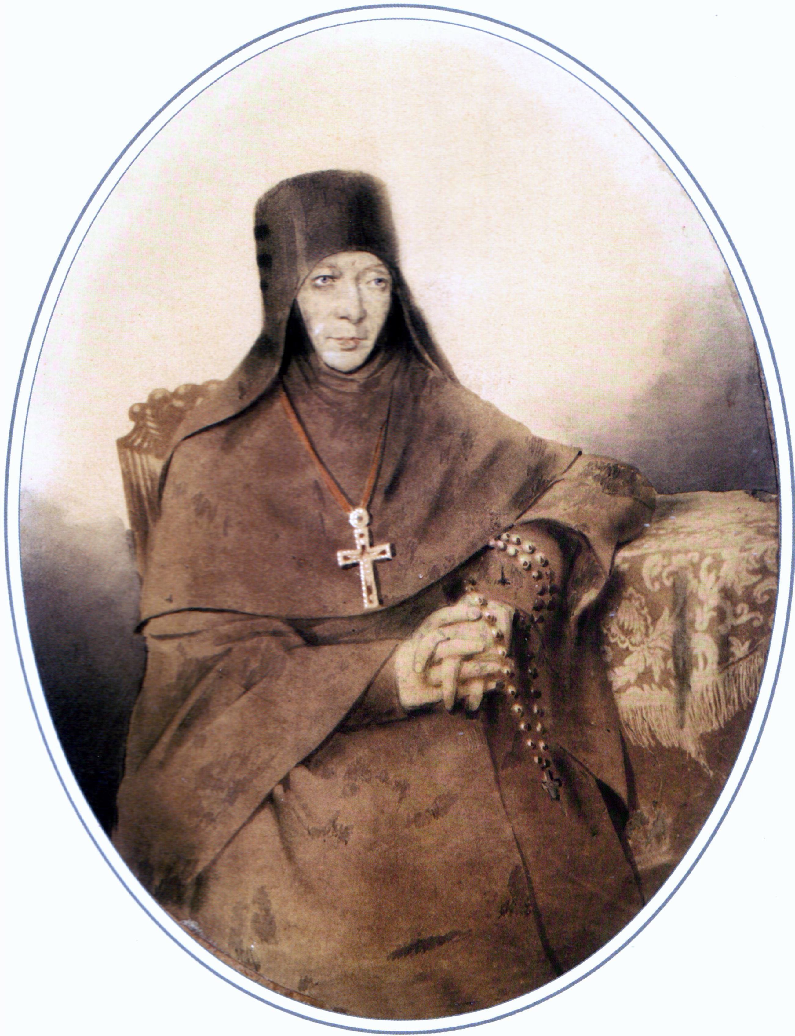 Портрет игуменьи Марии.